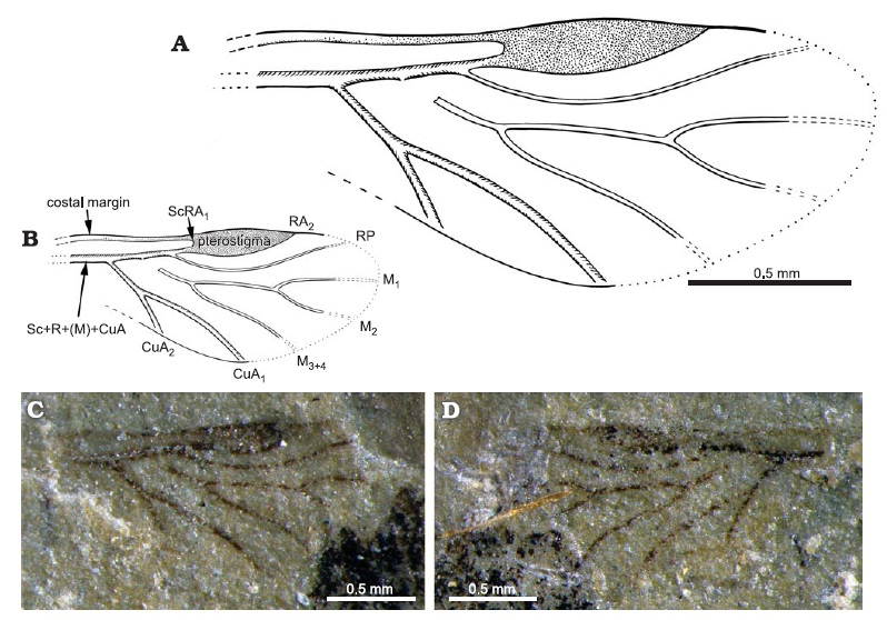 Forewing of the early Middle Triassic (early Anisian) aphid Vosegus triassicus gen. et sp. nov. A. Reconstruction. B. Venation scheme. C. Part (No. 5916). D. Counterpart (No. 5917).